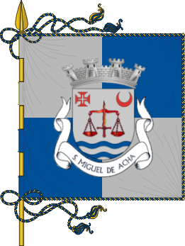 Bandeira da Freguesia